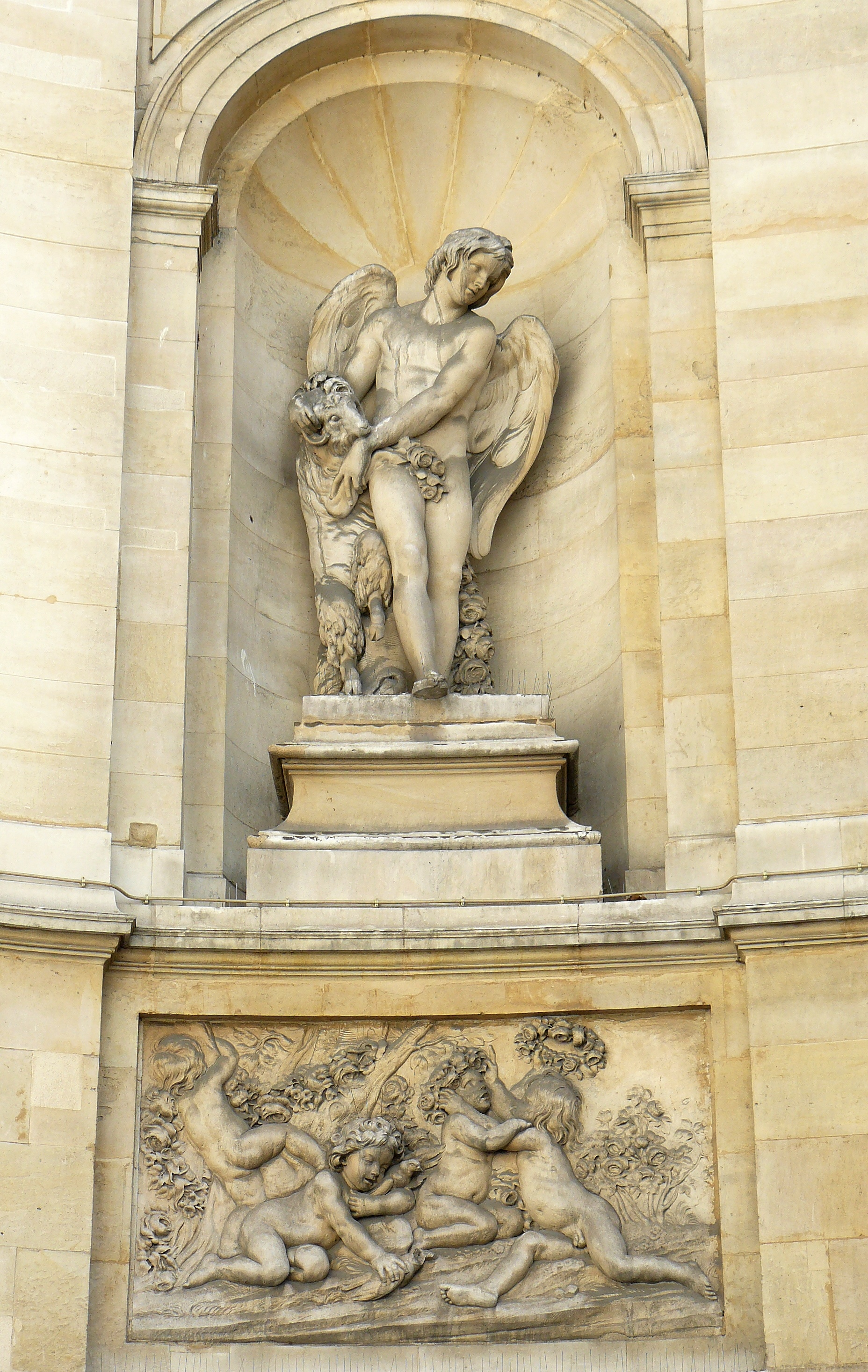 Fontaine des Quatre-Saison - Edmé Bouchardon - 1745 - Paris 7ème - Partie gauche, détail : le printemps